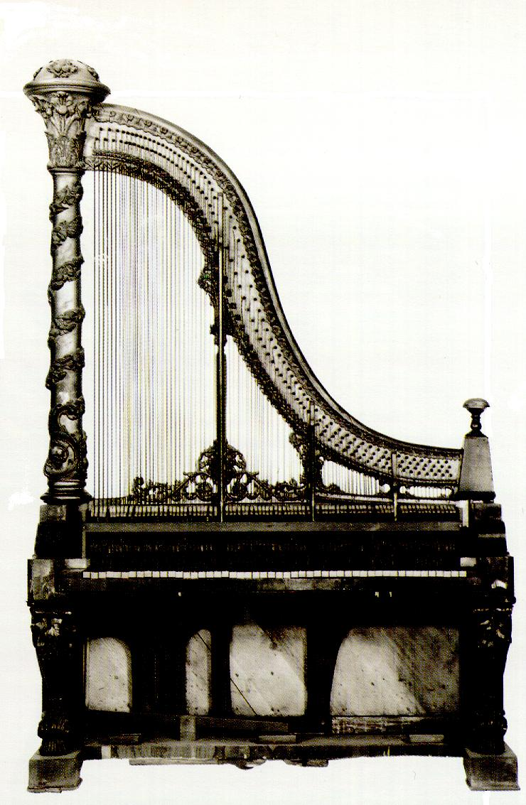 Harfenklavier